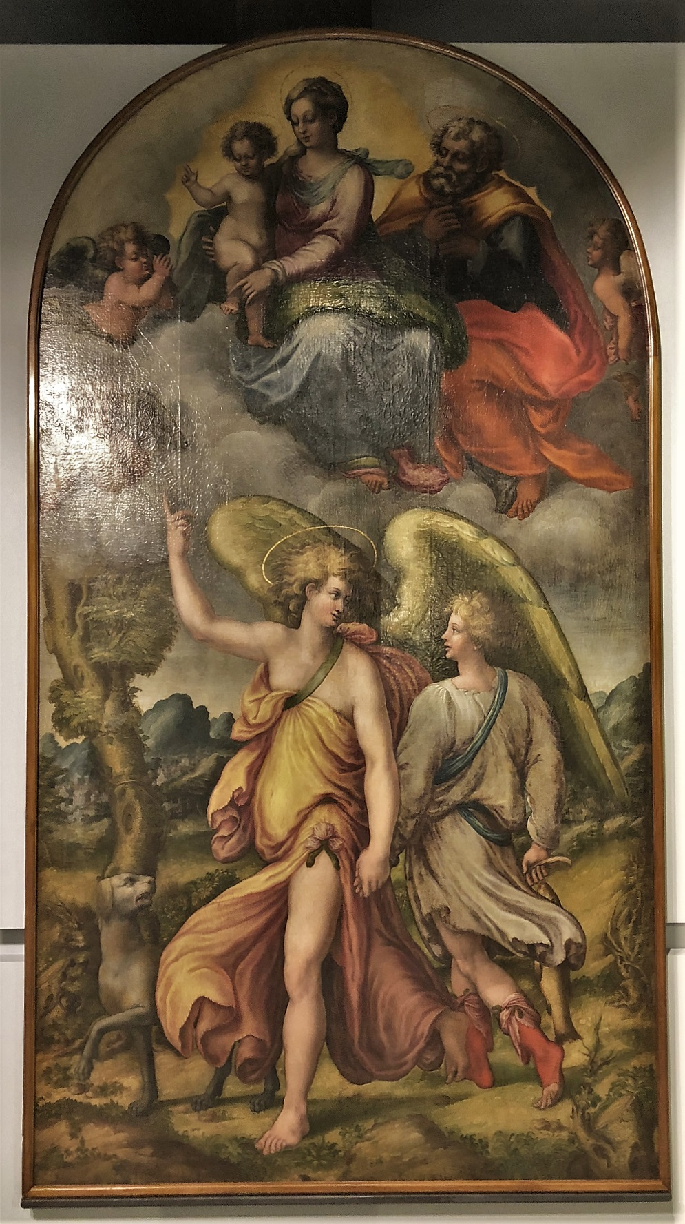 Olio su tela. Museo nazionale d'Abruzzo, L'Aquila; proveniente dalla basilica di San Bernardino, L'Aquila.